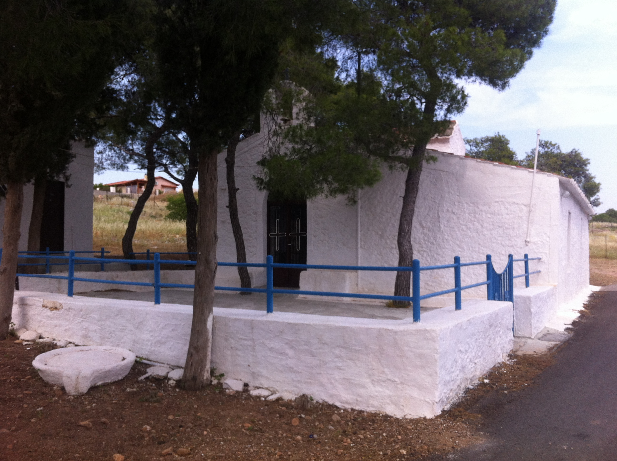 Ξωκλήσι Αγίου Δημητρίου στη θέση Βασιλικά Σαλαμίνας. Σημείο στο οποίο βρέθηκε το Μετρολογικό ανάγλυφο